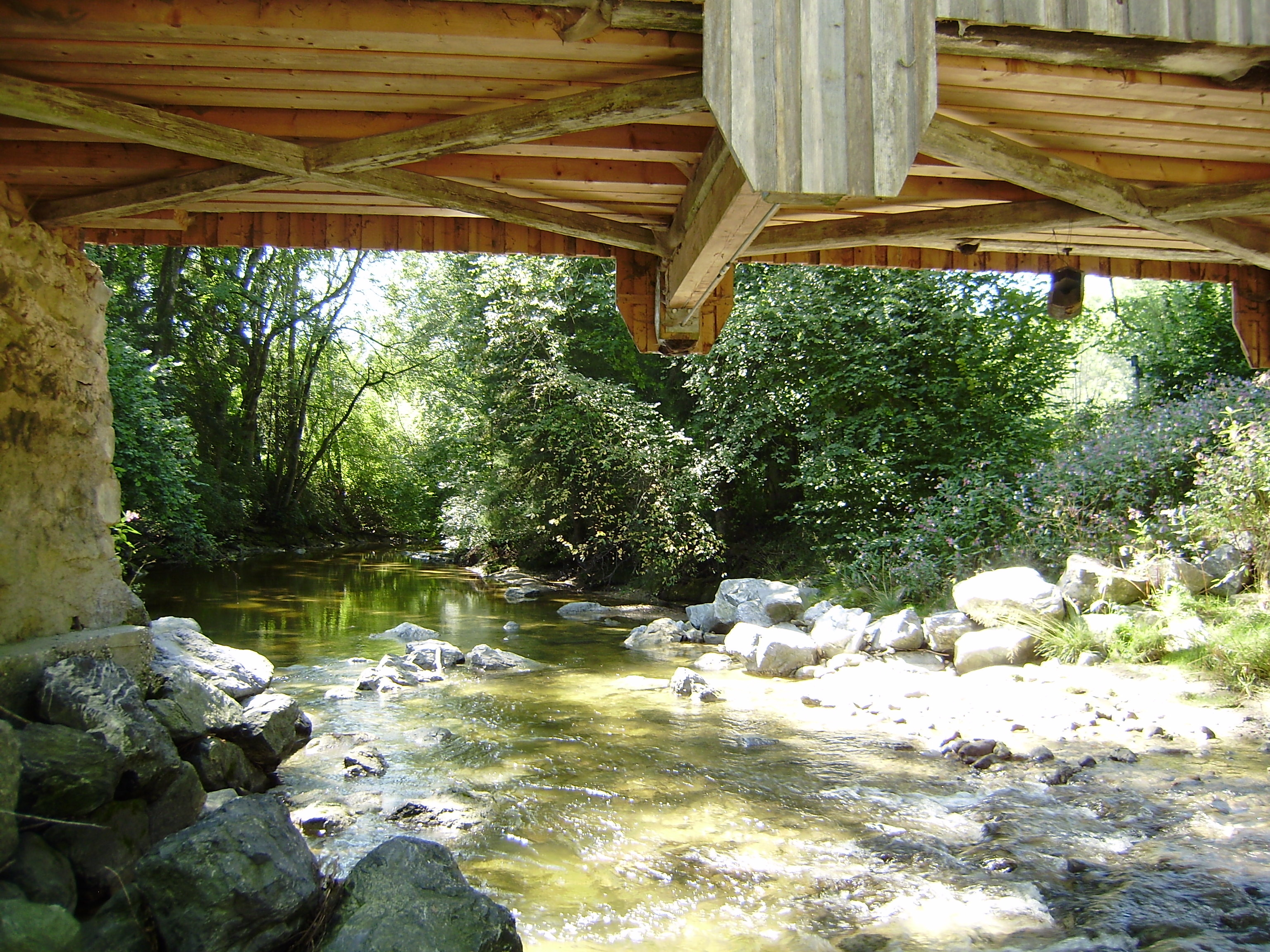 Leiblachbrücke Sigmarszell-Immen, Unterseite m verkleideter SprengwerkauflageThis is a photograph of an architectural monument.